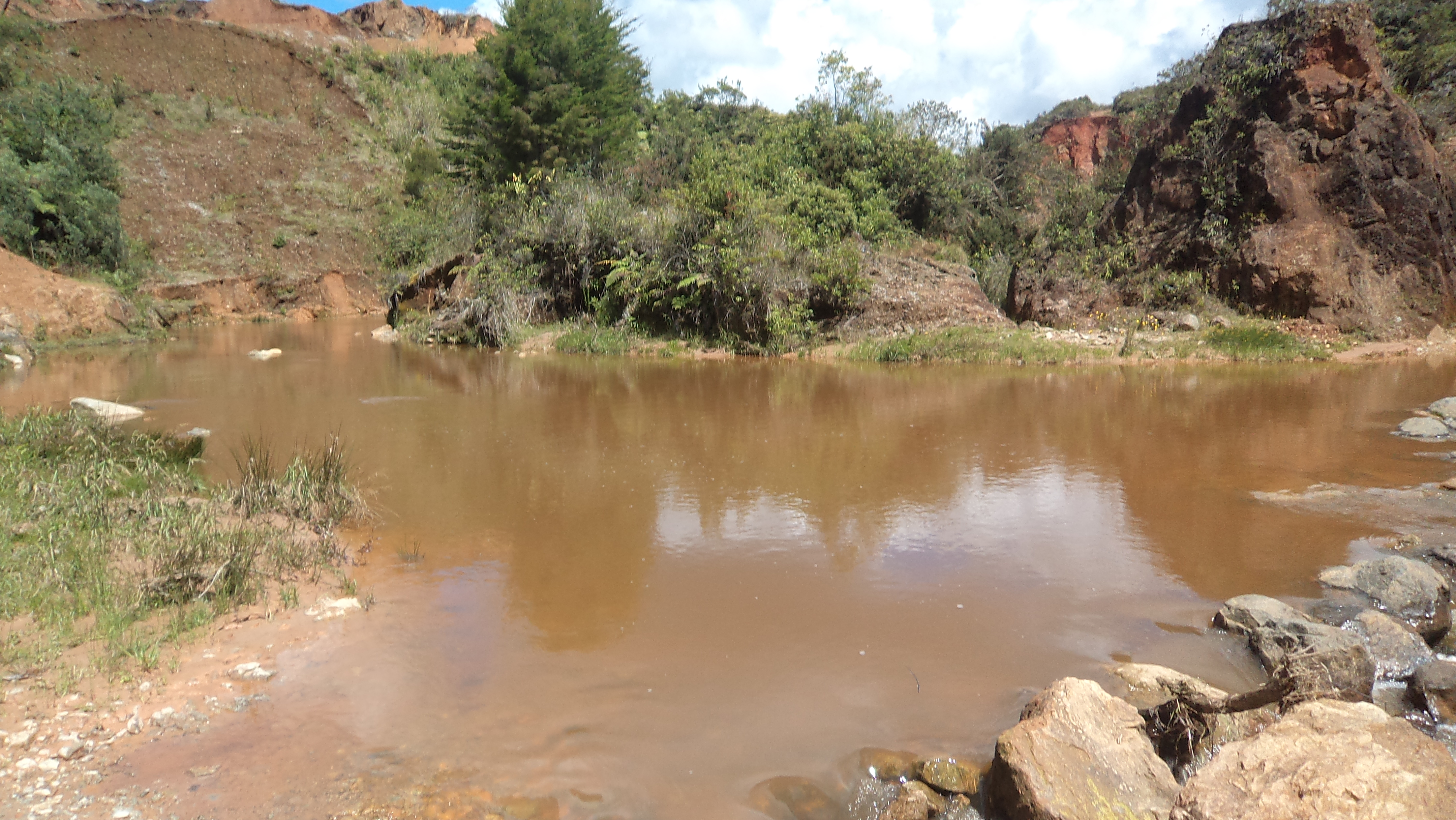 Río Guadalupe en Santa Rosa de Osos, pasando por una zona altamente desertificada